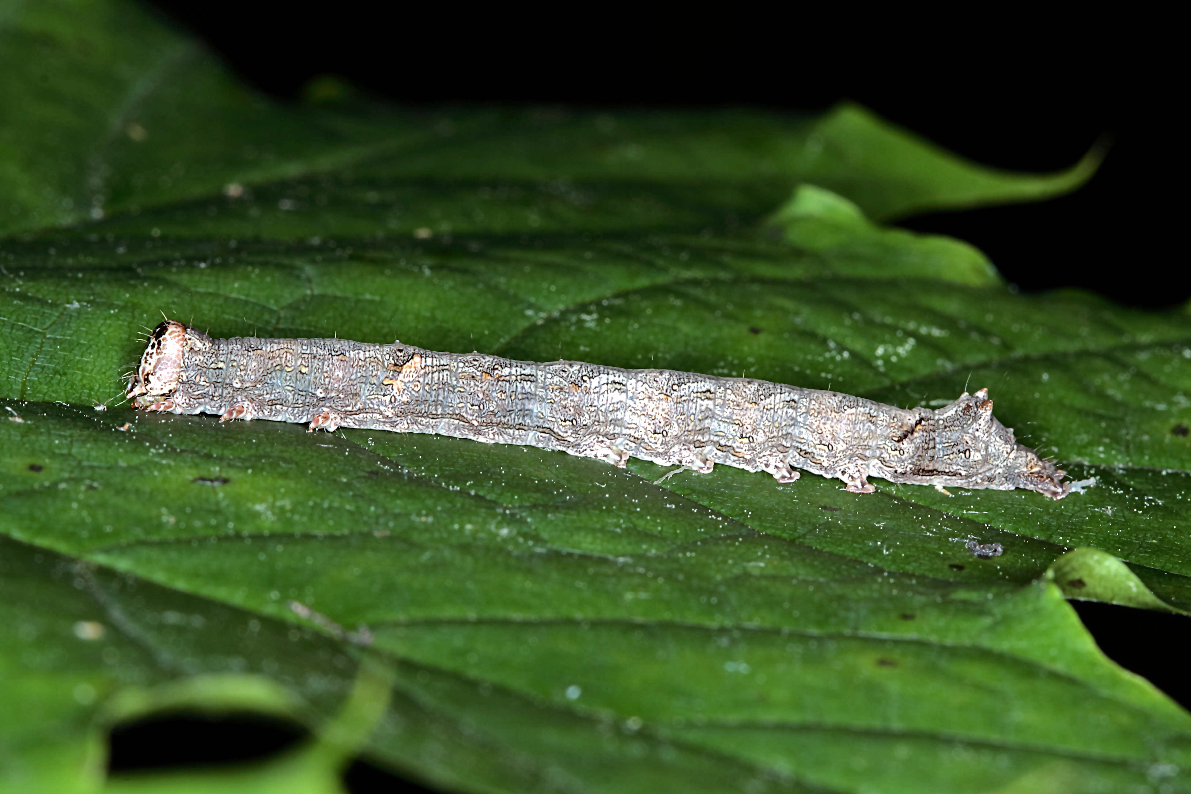 Blaues Ordensband, Raupe, Sachsen, Laubwald